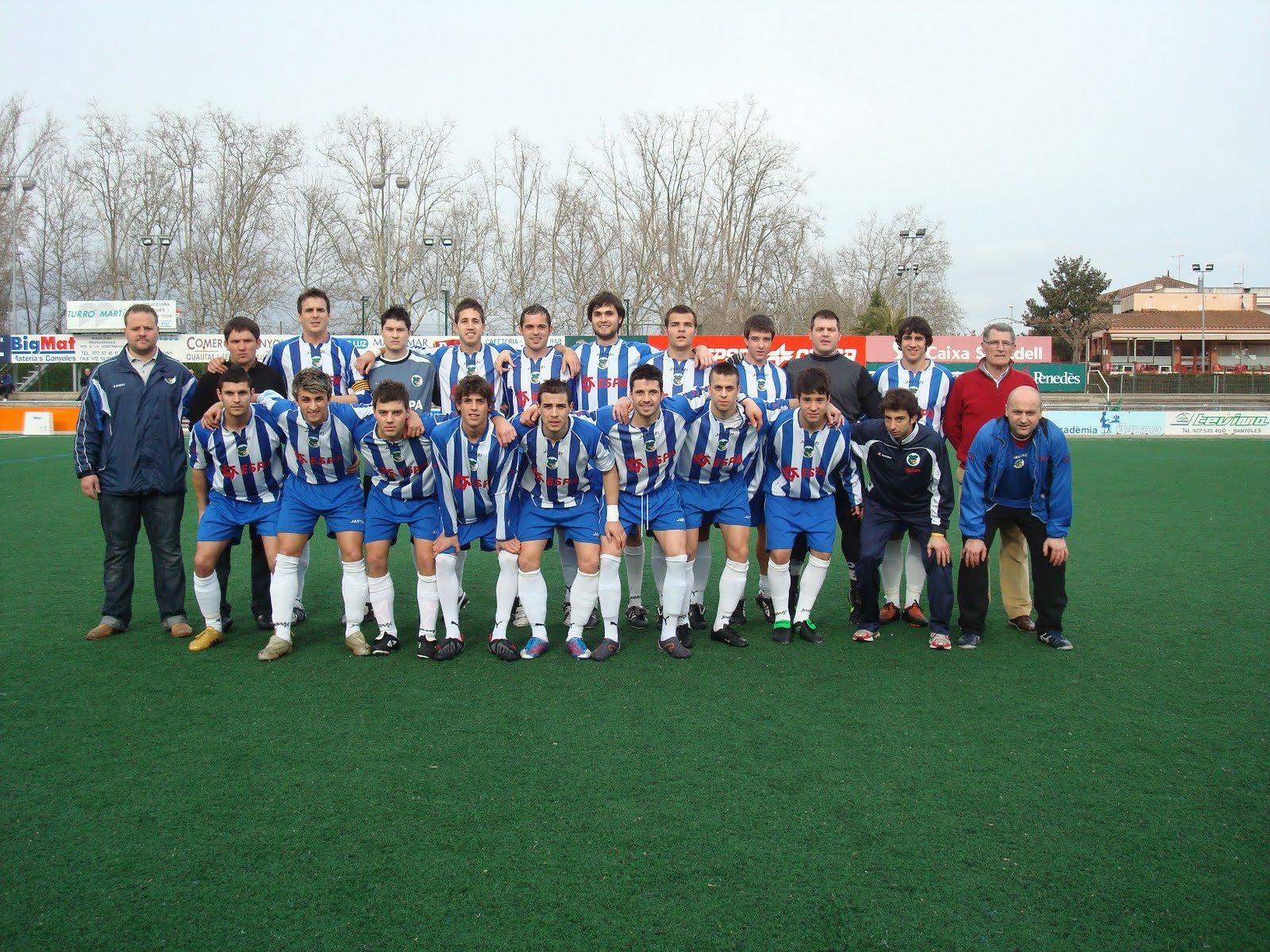 Equip de la U. E. Banyoles